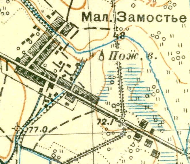 Топографическая карта Ленинградской области, квадрат О-36-13-А-г, деревня Малое Замостье